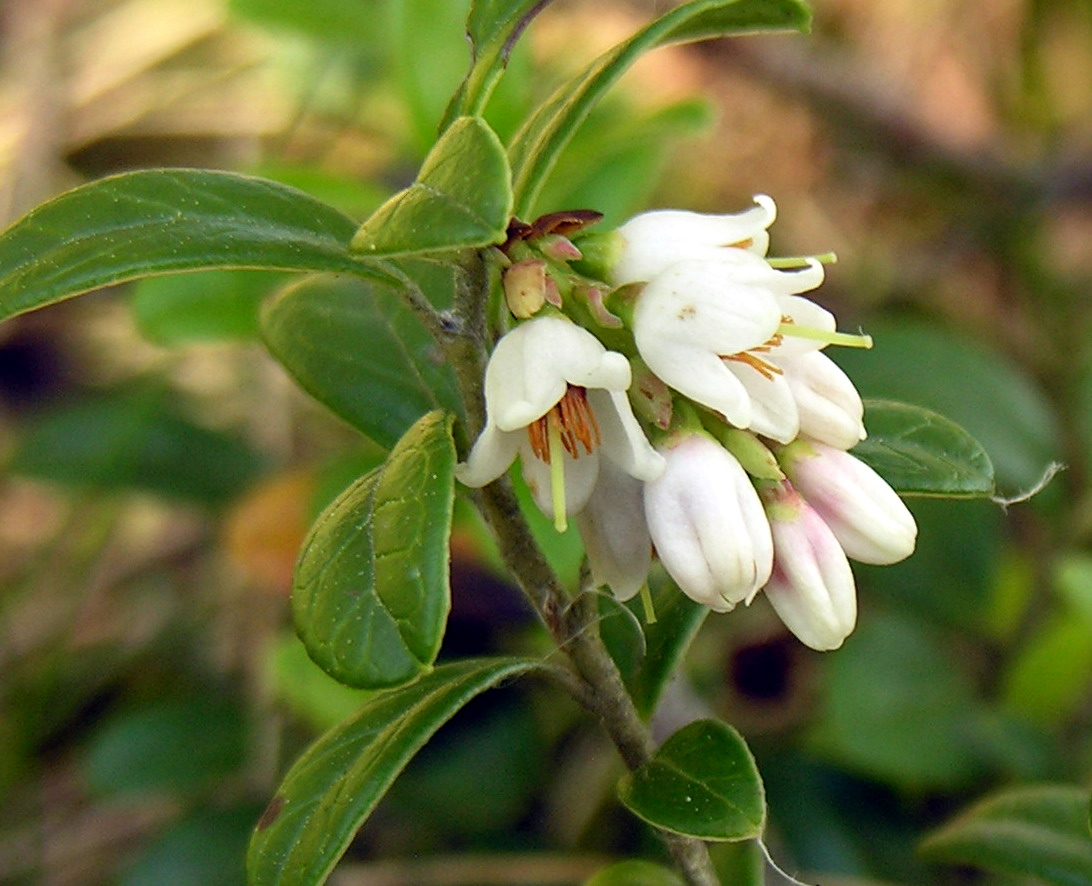 Bruknė (Vaccinium vitis-idaea) Šeima. Ericaceae Foto: Algirdas, 2006 m. birželio 3 d.